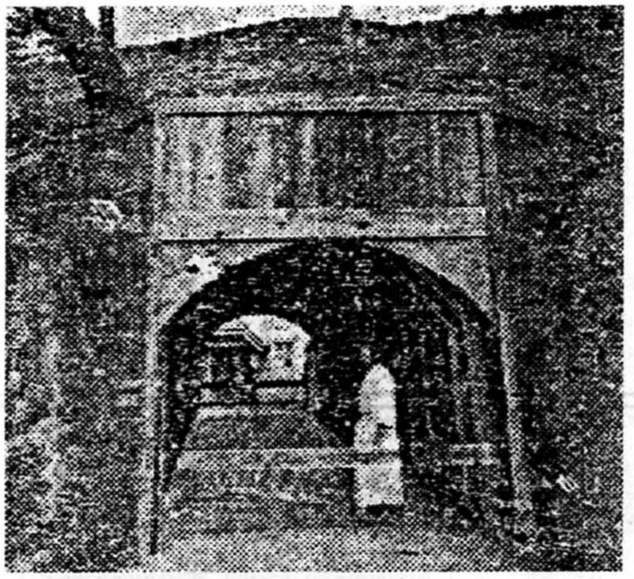 富山県護国神社境内の消防車用掩体壕